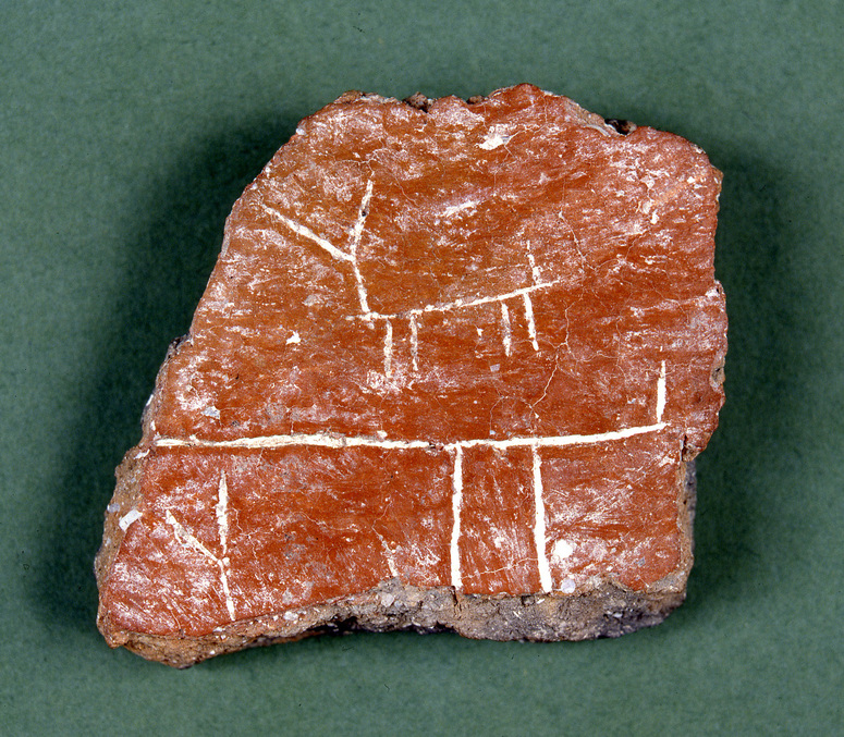 Fragmento de cerámica con decoración incisa donde se representan tres figuras de animales de forma muy esquemática, una de las cuales se encuentra entera y de las otras, una conserva la parte trasera y la otra la delantera. Las incisiones se encuentran rellenas de pasta blanca